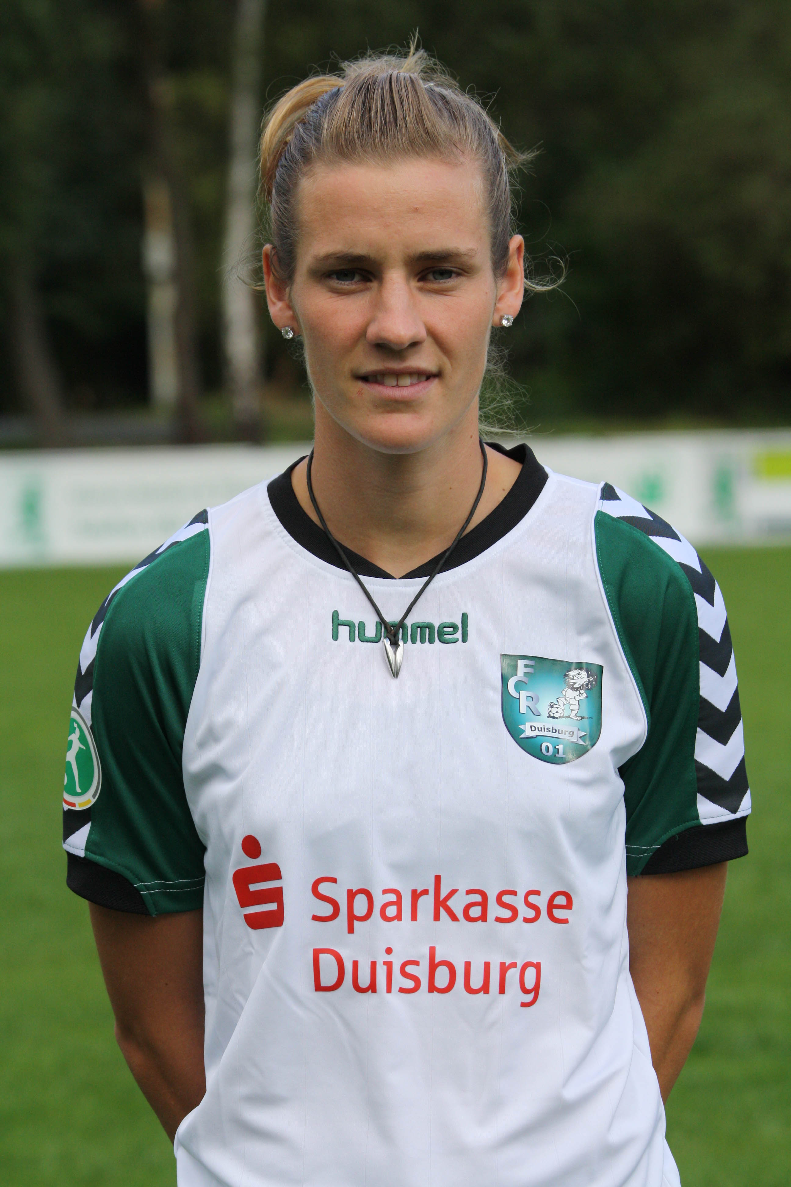 Simone Laudehr, FCR 2001 Duisburg, Saison 2011/12